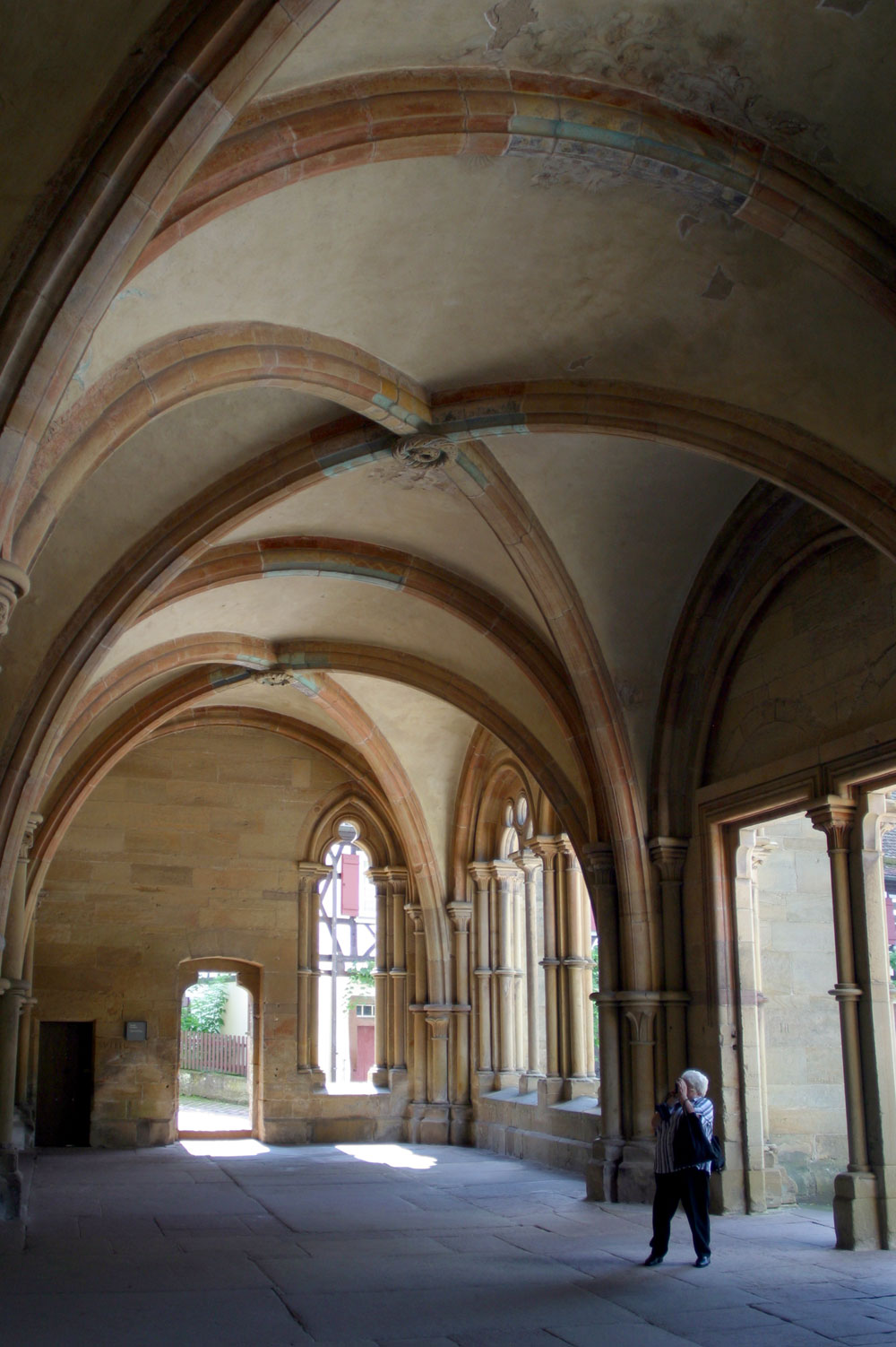 Kloster Maulbronn: Paradies, Innenansicht